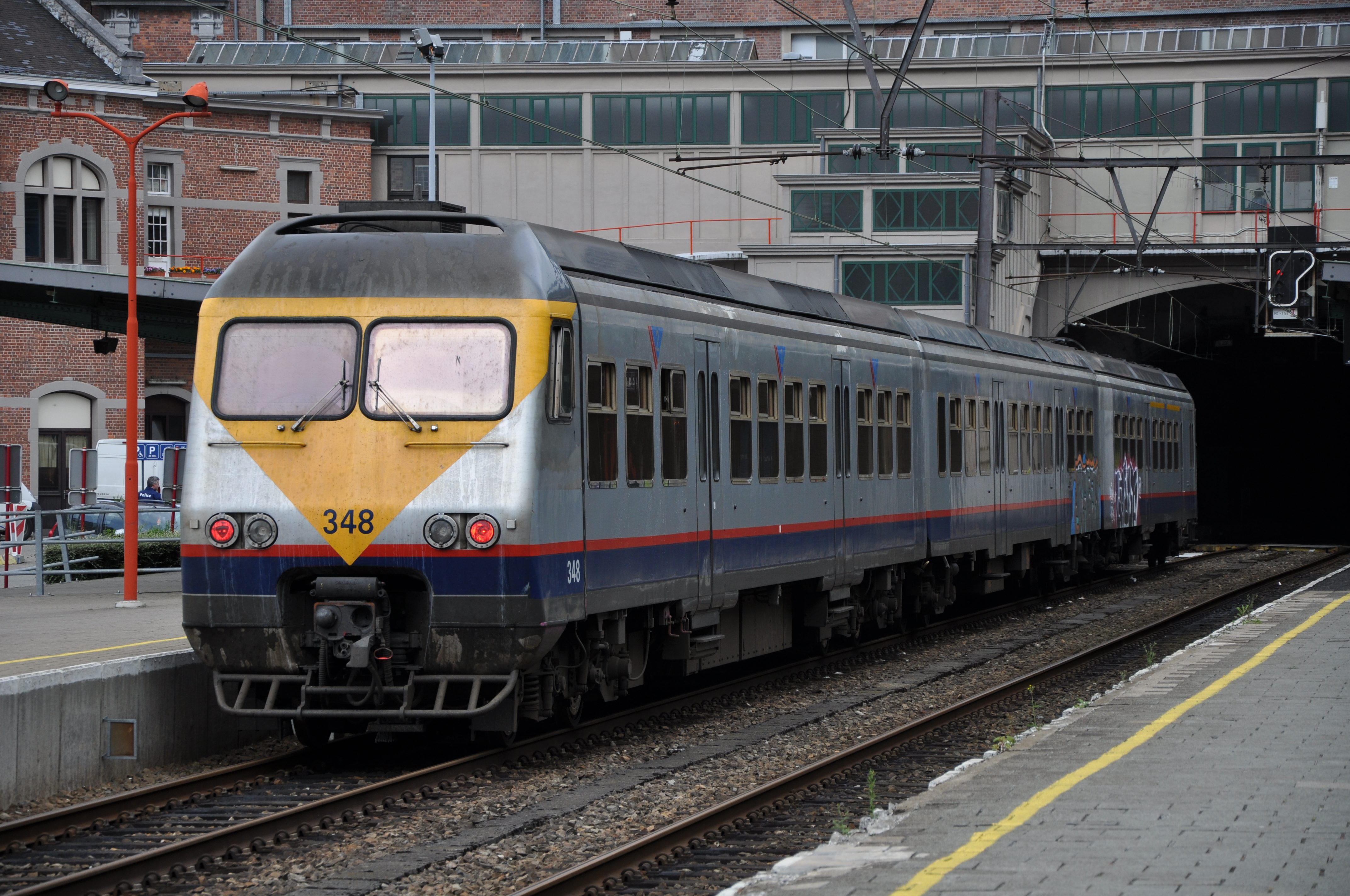 Bahnhof Verviers-Central mit Interregio